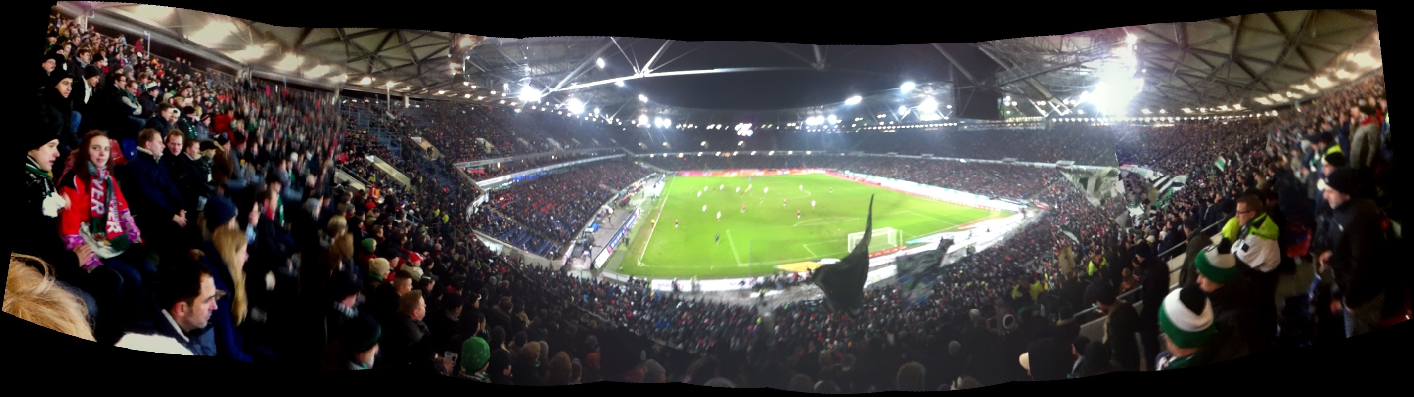 AWD-arena panorama.